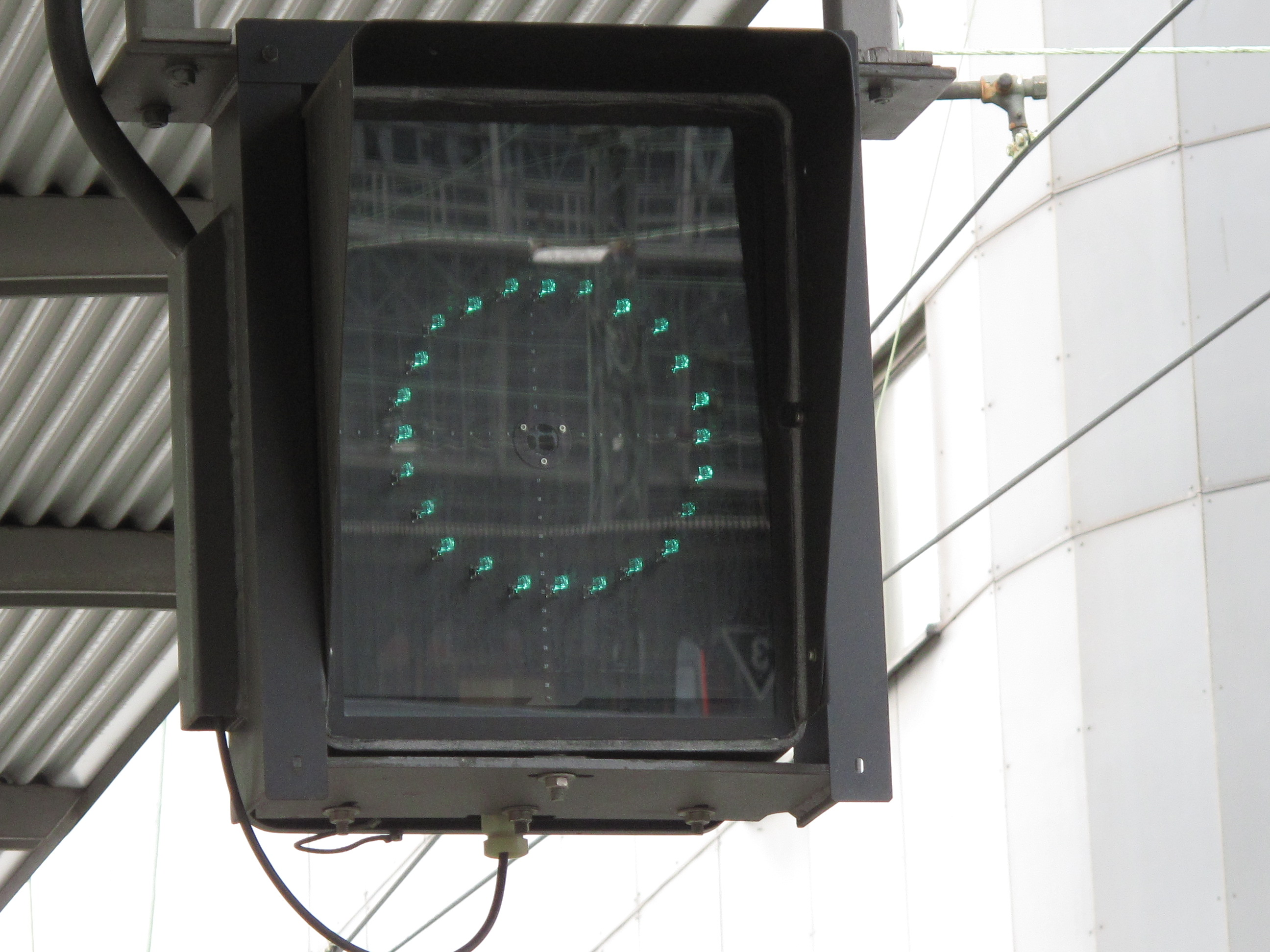 Zugpersonalsignal Zp9 - ein erleuchteter grüner Kreis